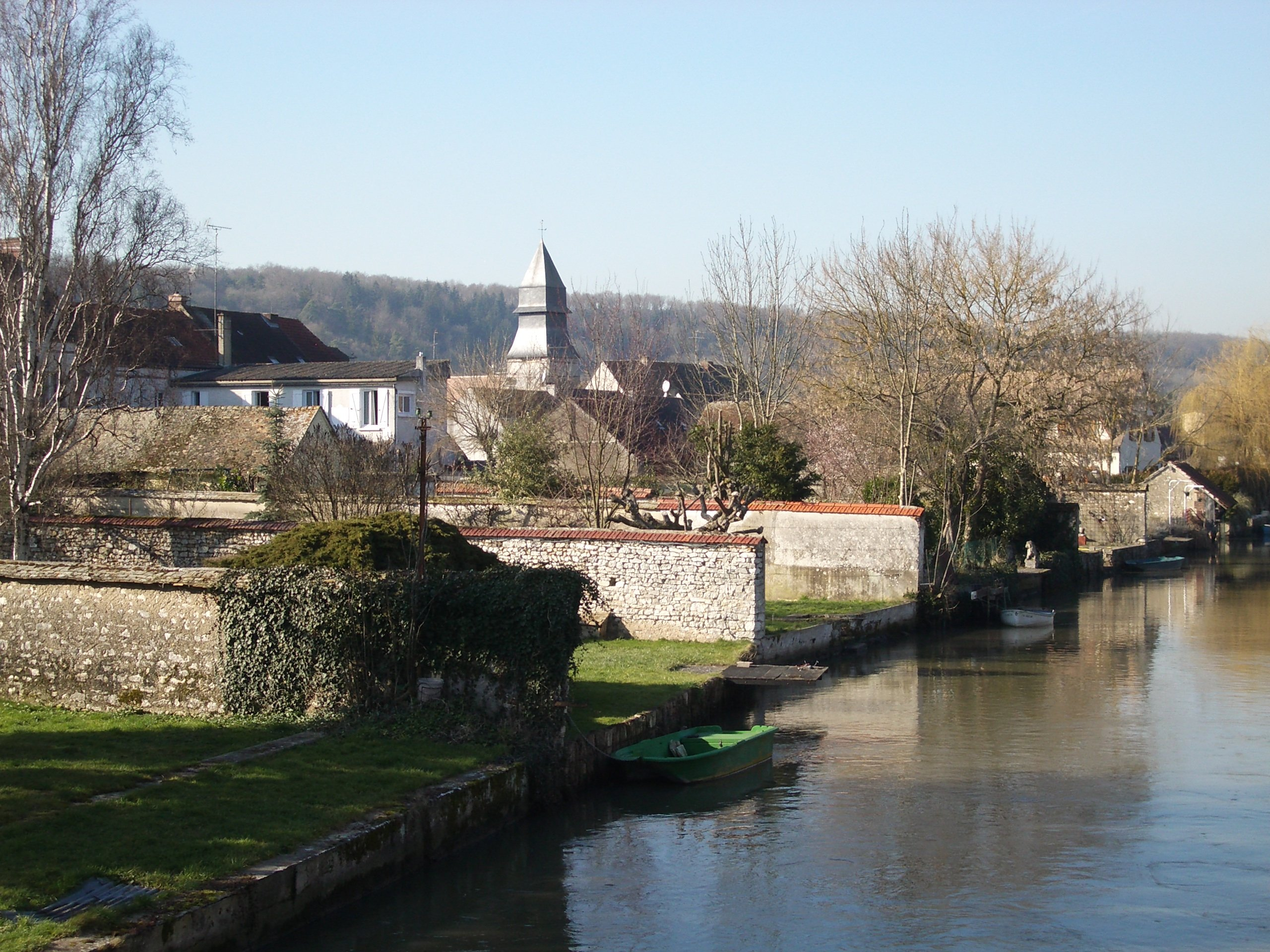 Vue du pont sur l'Eure sur la commune de Garennes-sur-Eure.